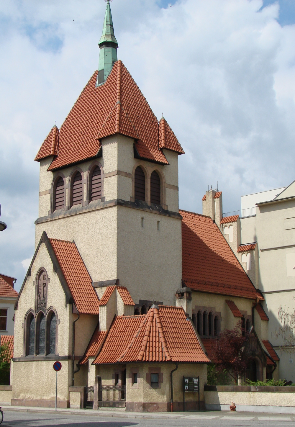 Baudenkmal Die Kirche des guten Hirten ist eine Stiftung des Gubener Hutfabrikanten Friedrich Wilke.